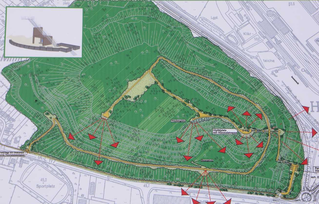 Plan der Millicher Halde, Hückelhoven (Aussichtspunkte und Himmelstreppe)